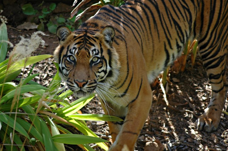 Sumatran tiger at Adelaide Zoo